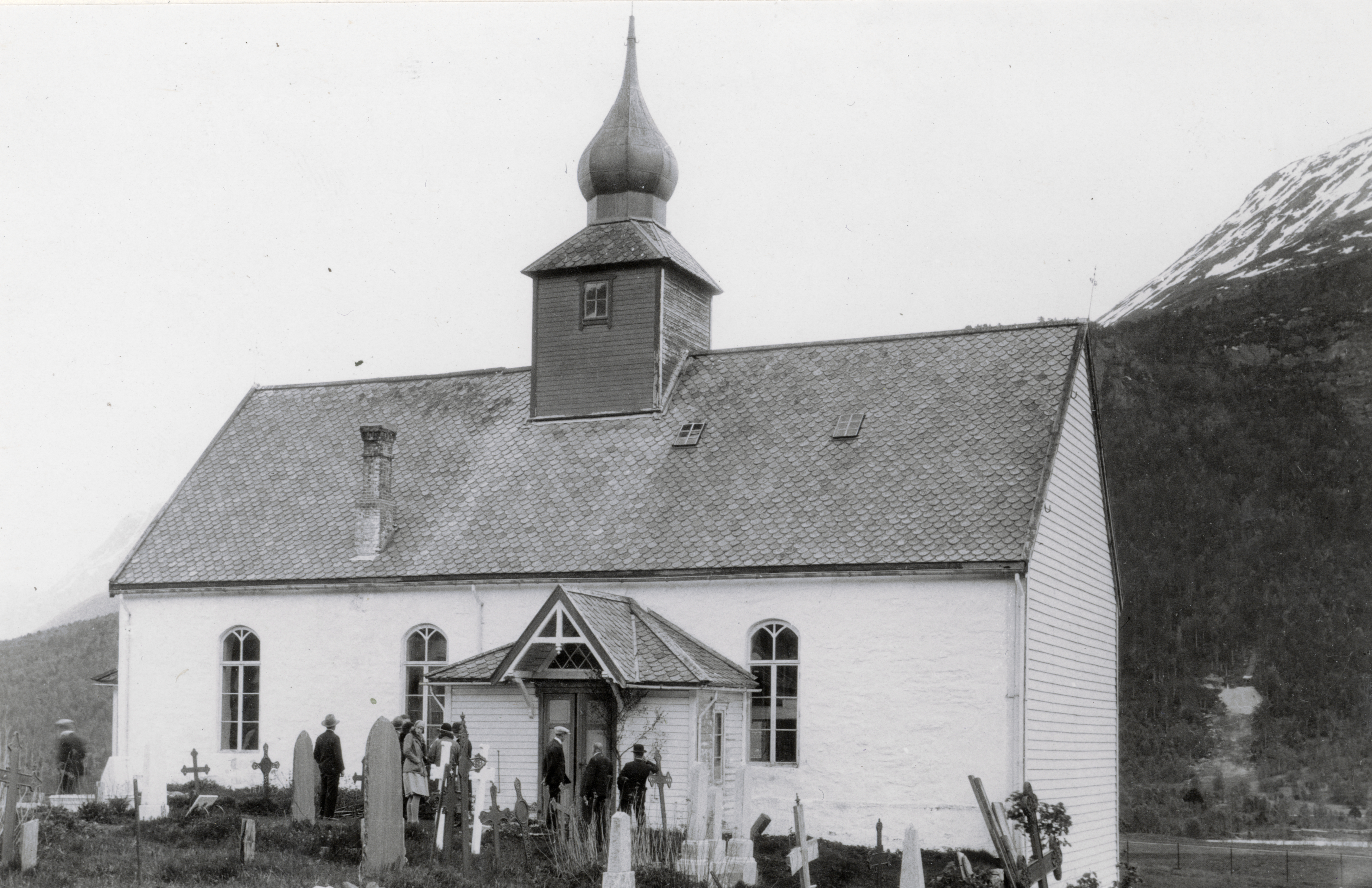 Hen kirke i Hen, Møre og Romsdal Nord fasade 1930. This image on crowdsourcing geotagging platform Fotodugnad